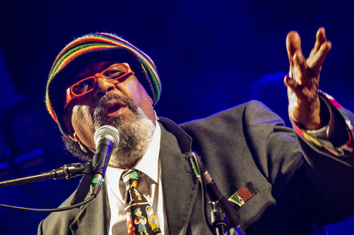 Canelones, 5 de mayo de 2013: Rubén Rada y su banda fueron los encargados de cerrar el espectáculo por los 200 años del Primer Gobierno Patrio; referencia: Bicentenario 1er Gobierno Patrio, Canelones (1813-2013): Larbanois & Carrero y Rubén Rada presentes en el Bicentenario del Primer Gobierno Patrio en Canelones.